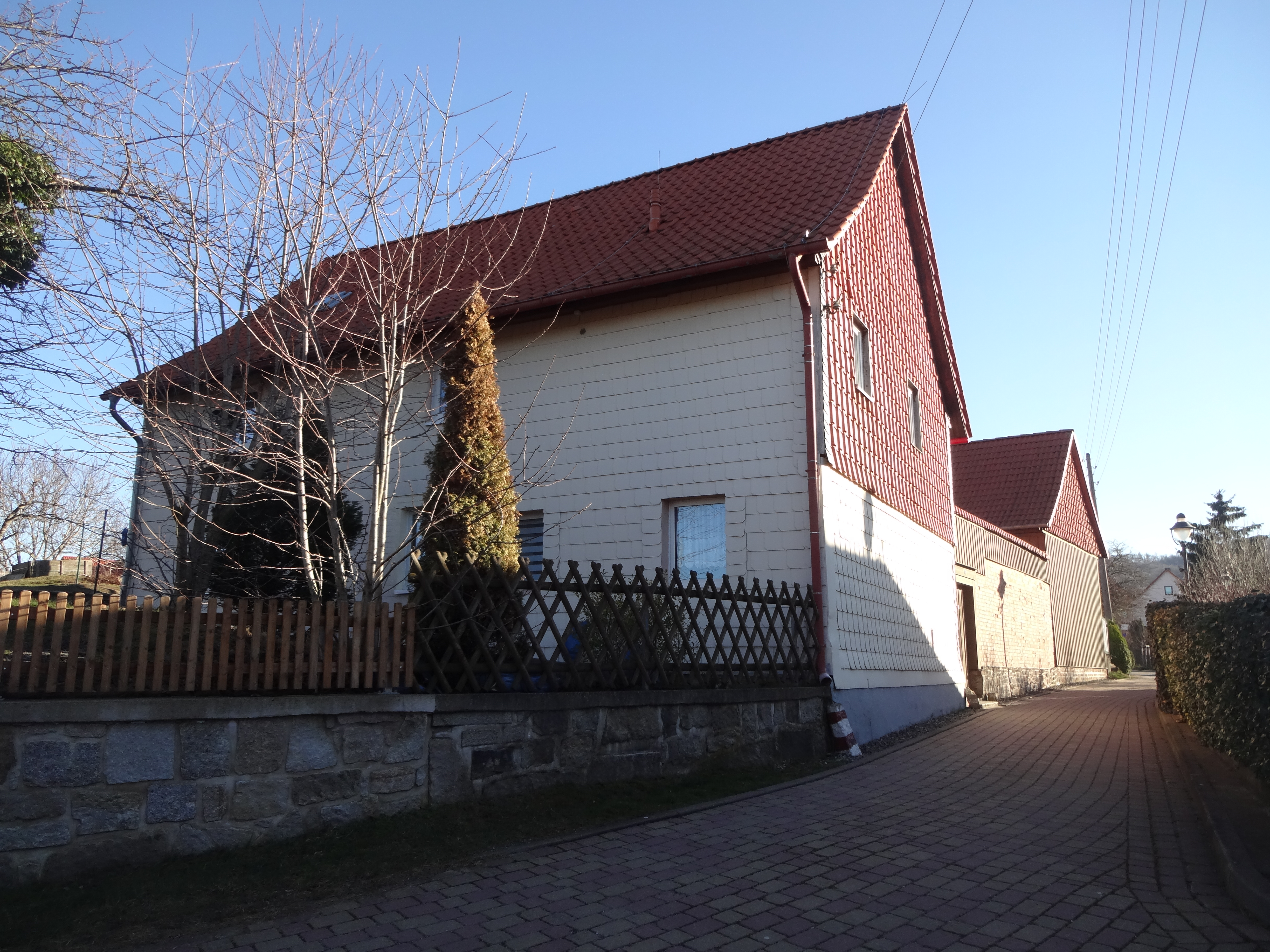 denkmalgeschützter Bauernhof in Neuen Weg 3 in Darlingerode